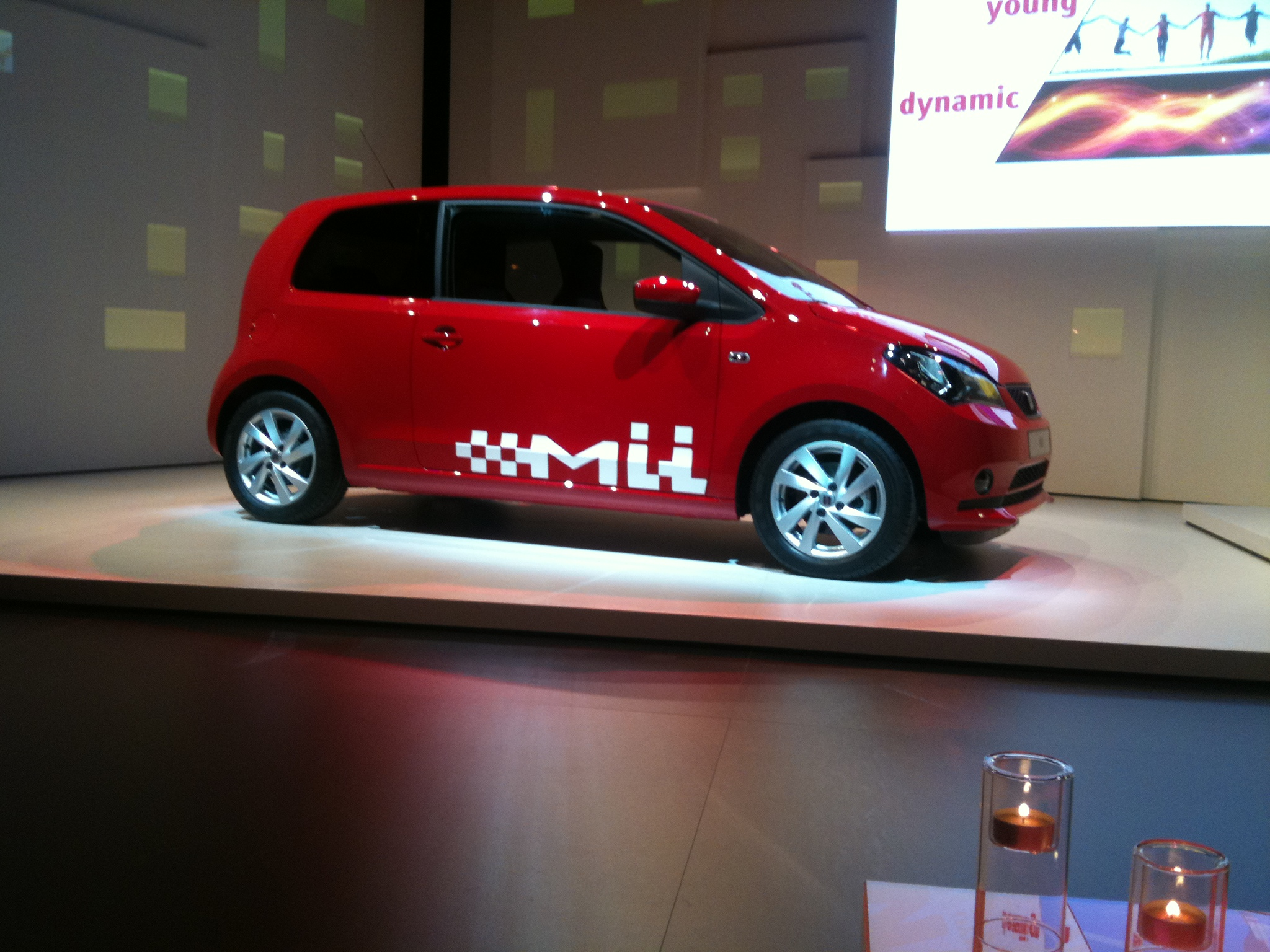 IMG_0696, SEAT Mii presentation